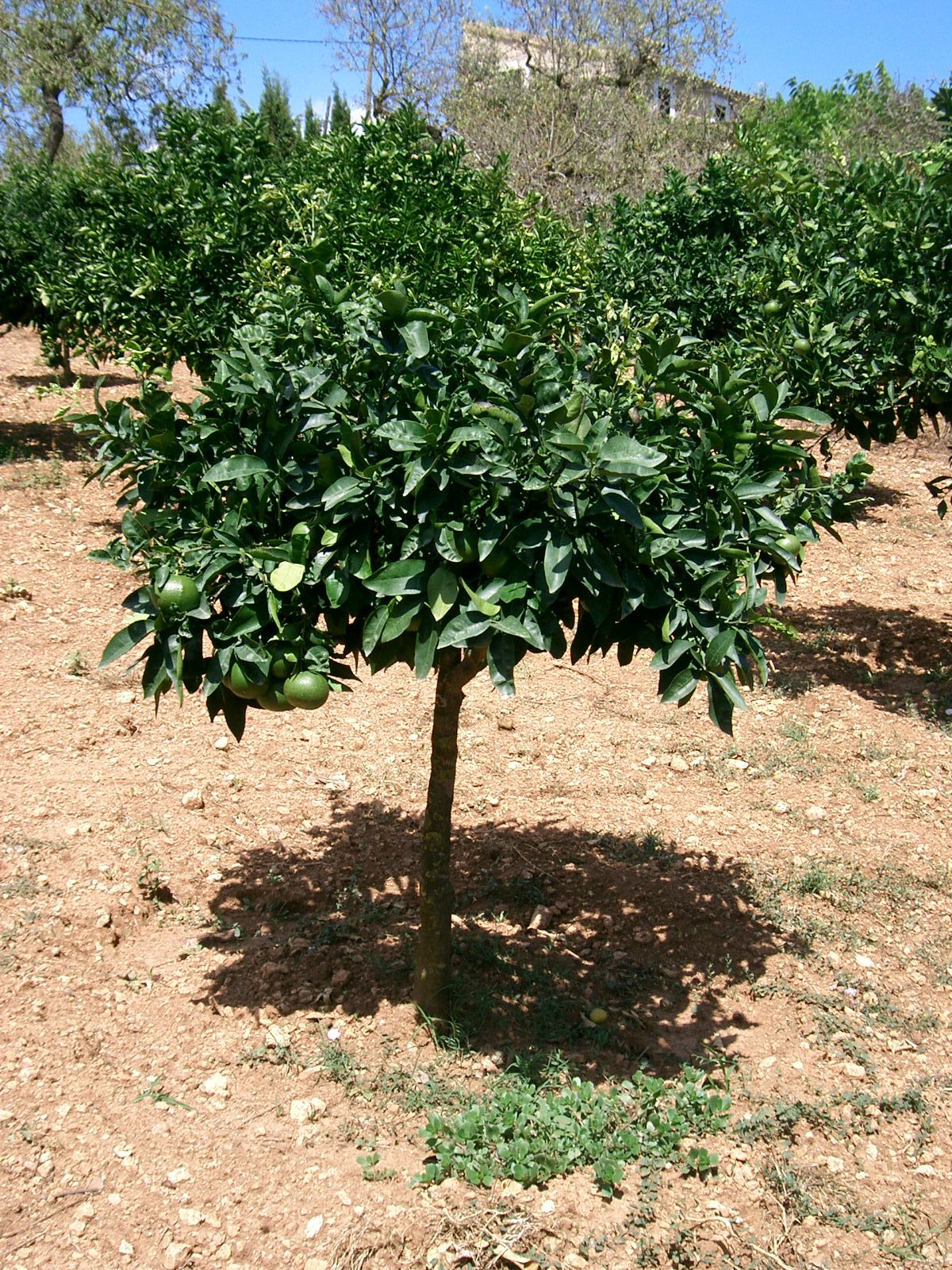 Aranger. Citrus maxima. Son Carrió. Mallorca.